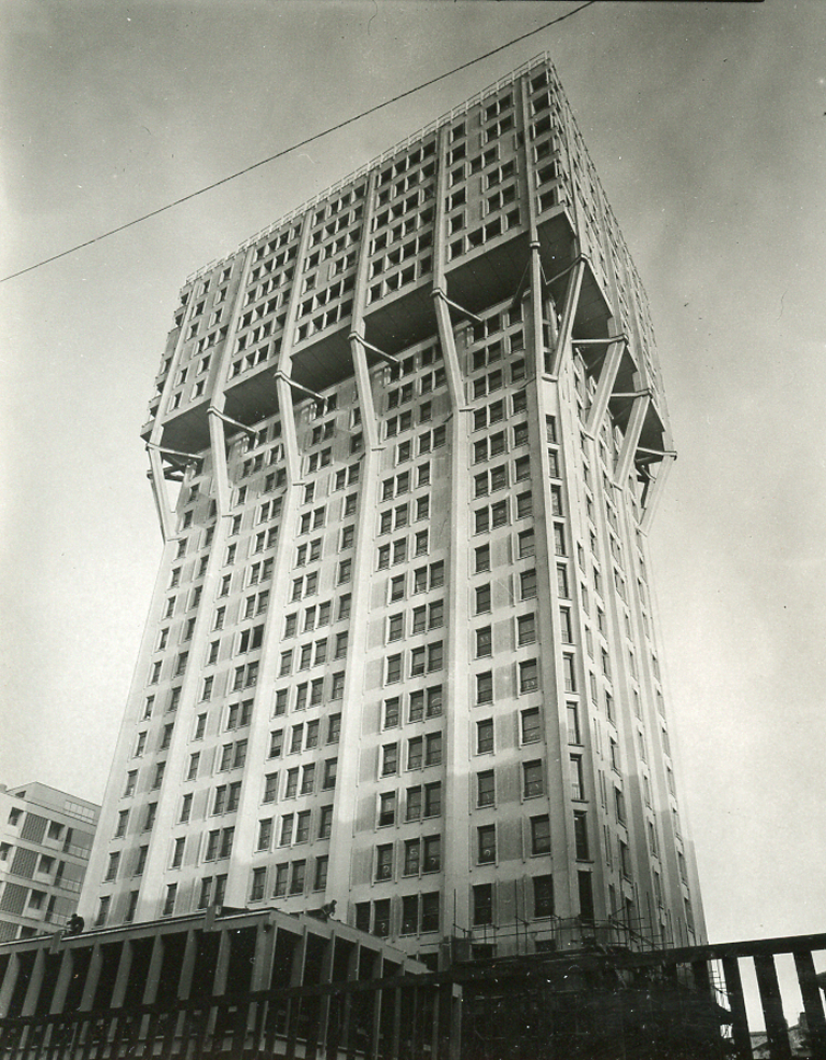 Servizio fotografico : Milano, 1960 / Paolo Monti. - Fototipi: 2 : Positivo b/n, gelatina bromuro d'argento/ carta, provino a contatto da pellicola 10x12. - ((La suddetta serie è contenuta nella scatola identificata con la numerazione 142; sul coperchio iscrizione manoscritta a pennarello: "Contatti 7a"